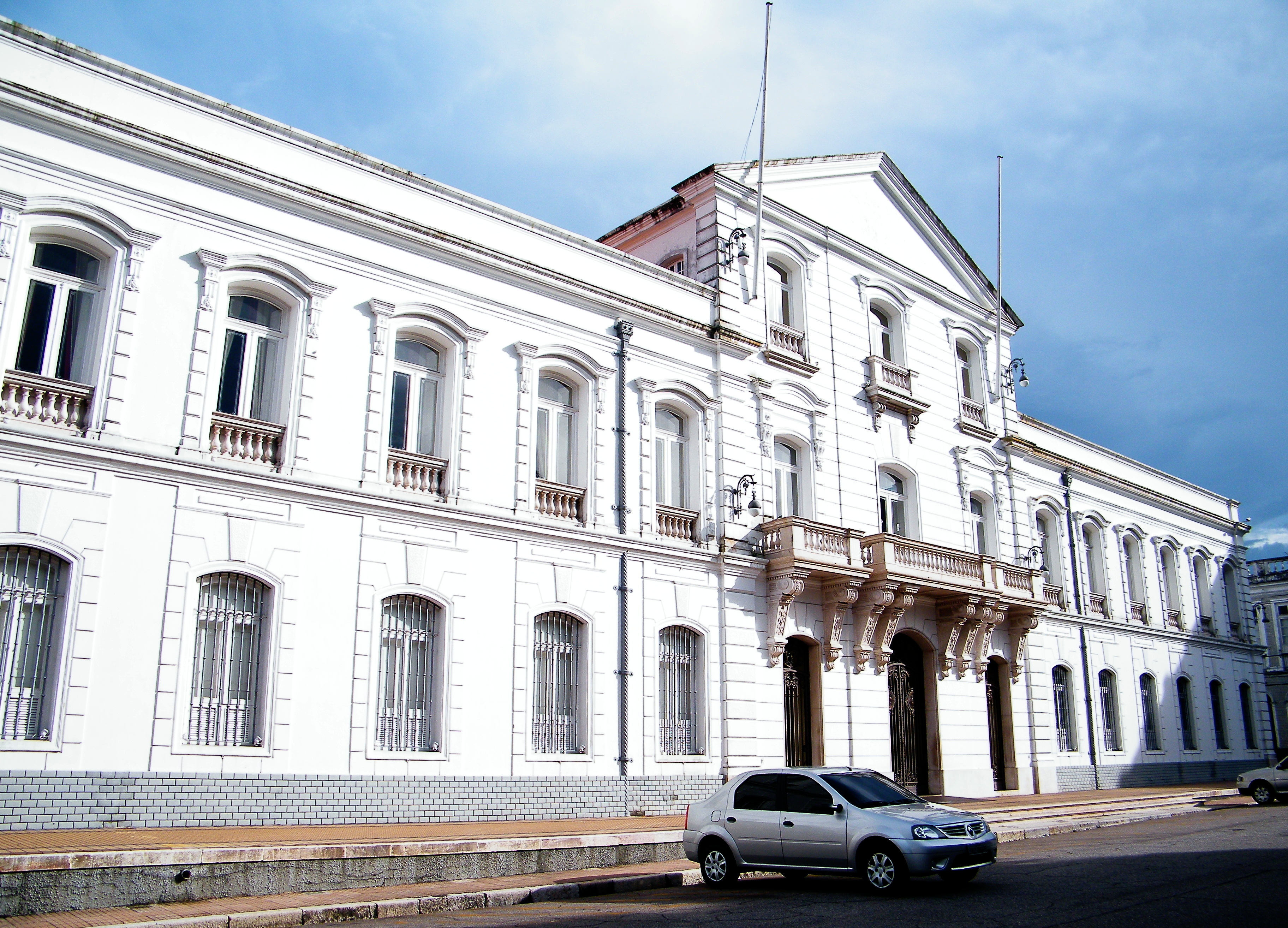 Palácio Lauro Sodré, é um prédio histórico sede do Museu do Estado do Pará a partir de 1994. Belém do Pará Amazônia - Brasil ---- Belém of Pará Amazon - Brazil